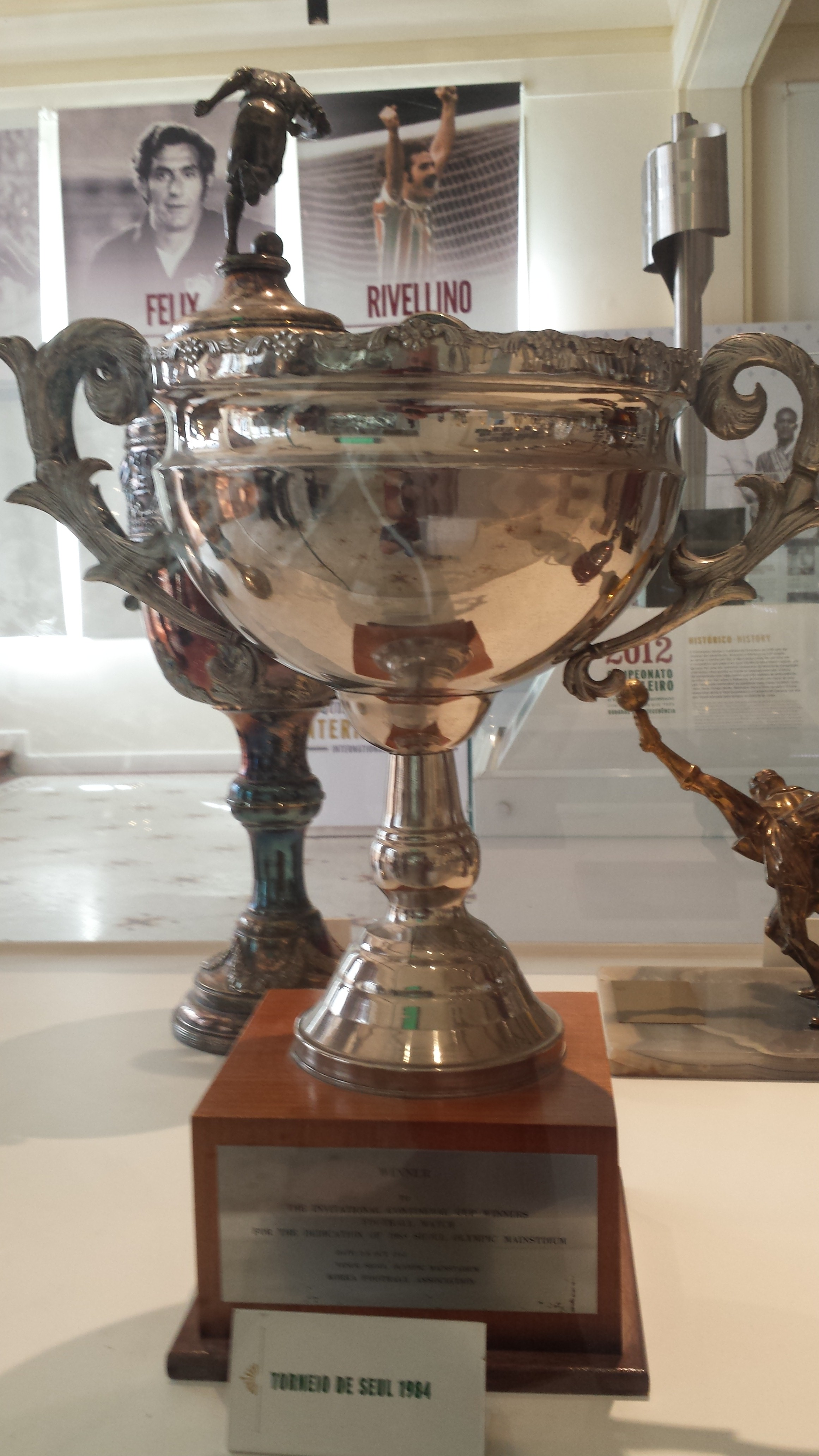 Taça do Torneio de Seul de 1984 que inaugurou esse grande estádio sul-coreano.